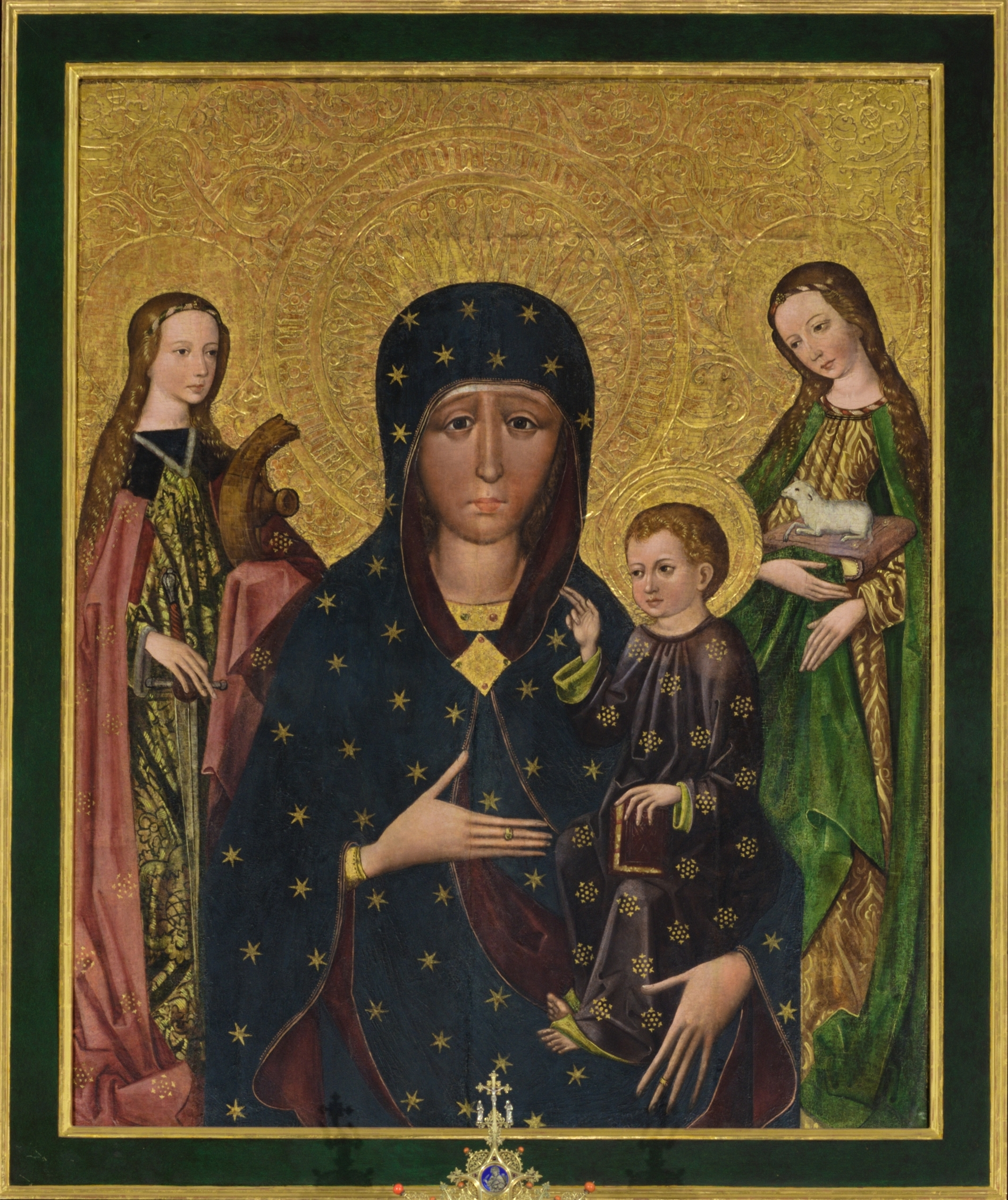 Matka Boska Bytomska, Madonna Bytomska (z lewej Katarzyna Aleksandryjska, z prawej Agnieszka Rzymianka, prawdopodobnie później domalowane), obraz nieznanego autora w ołtarzu bocznym kościoła Wniebowzięcia Najświętszej Maryi Panny w Bytomiu, przed obrazem monstrancja z hostią i świece